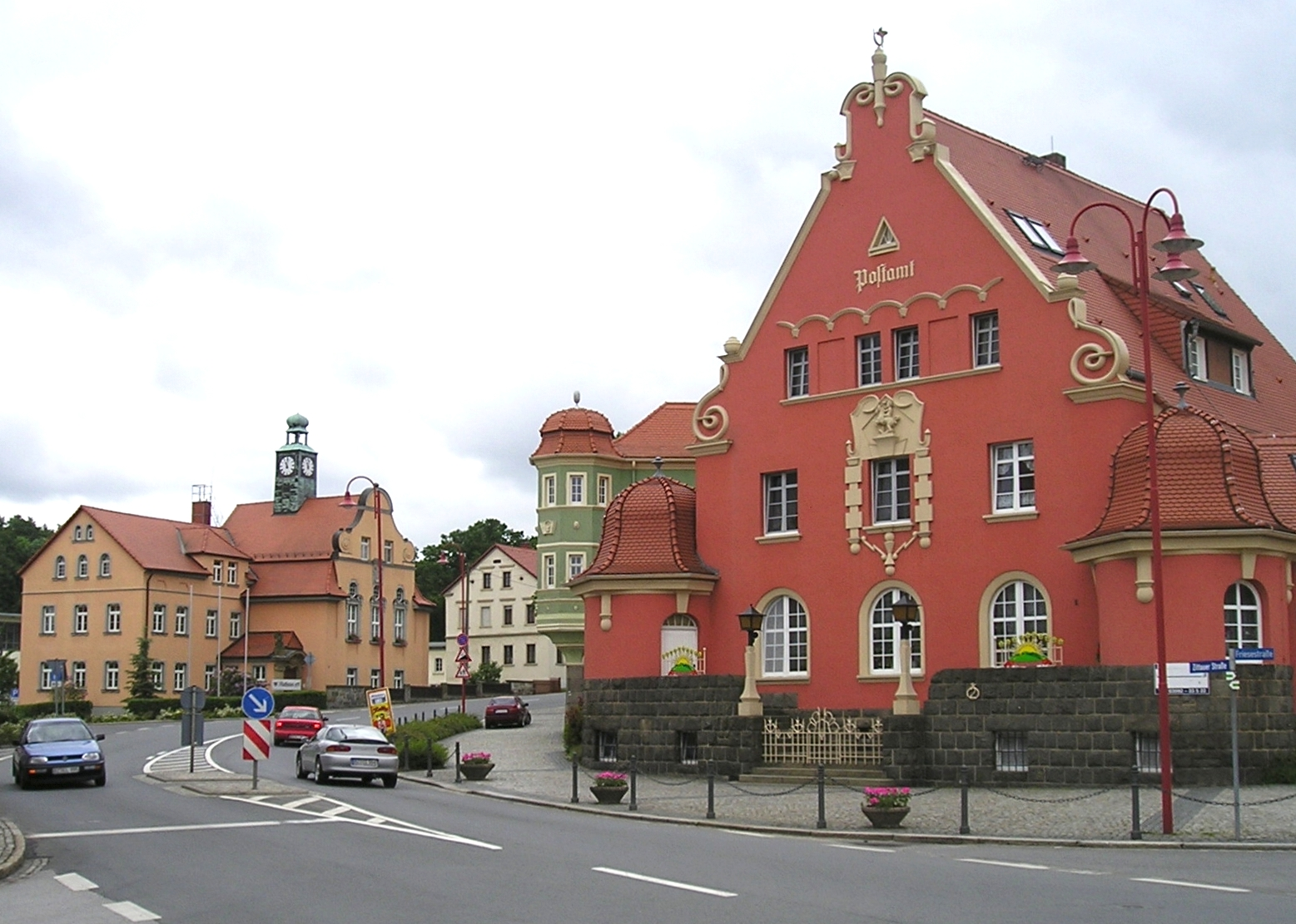 Kirschau: Ortskern mit Rathaus und Postamt, aufgenommen am 11.06.05, selbst fotografiert von Benutzer:Mudscha, GNU-FDL